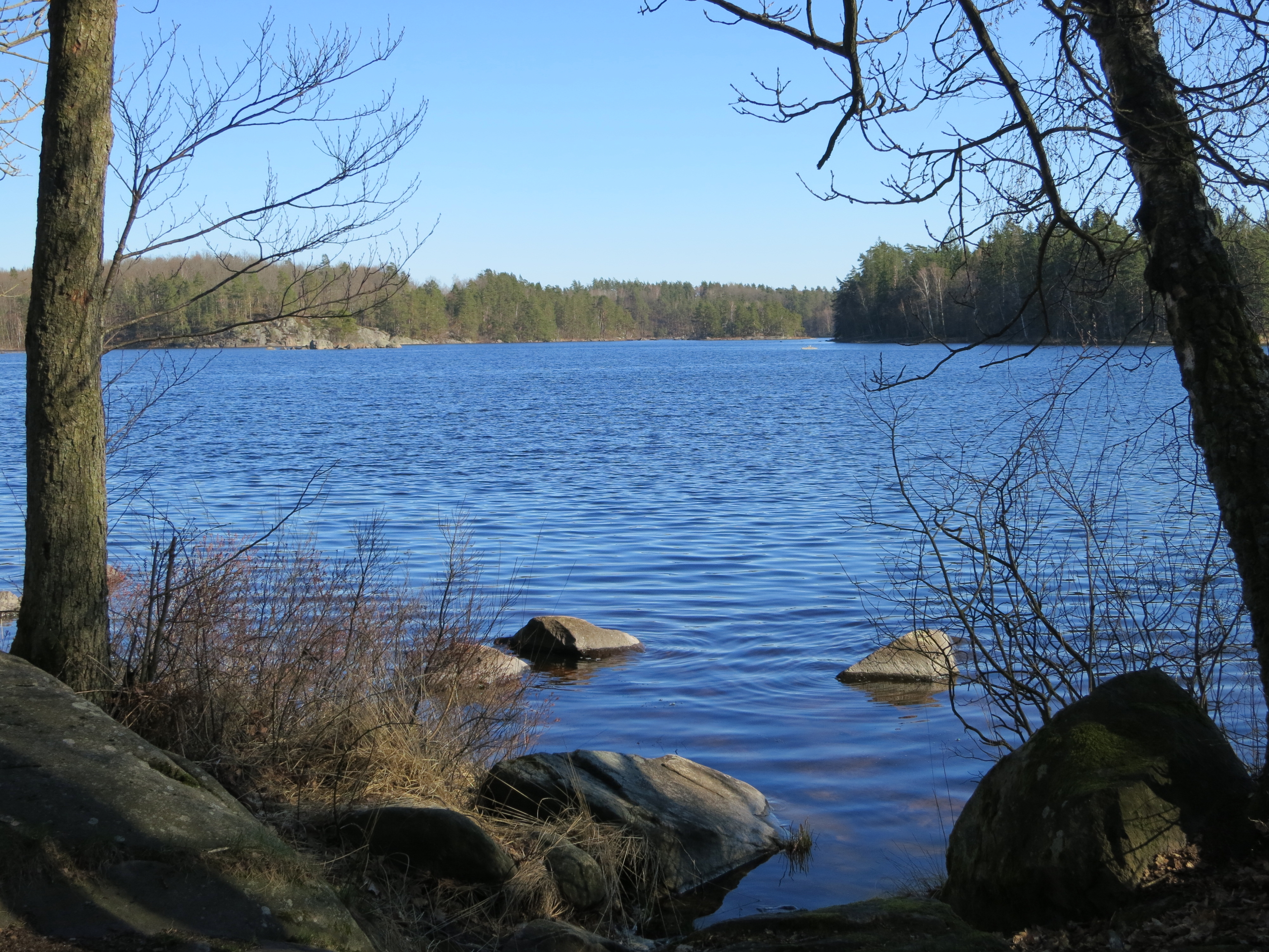 Filkesjön